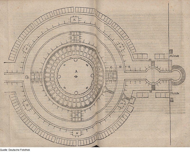 Original image description from the Deutsche Fotothek Architektur & Festungsbau & Stadtmauer & Klause